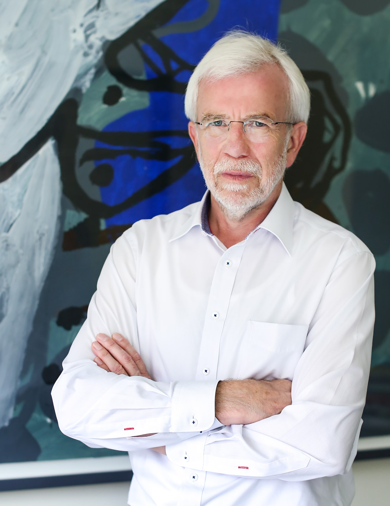 Ludwig, Wolf-Dieter (Mediziner)